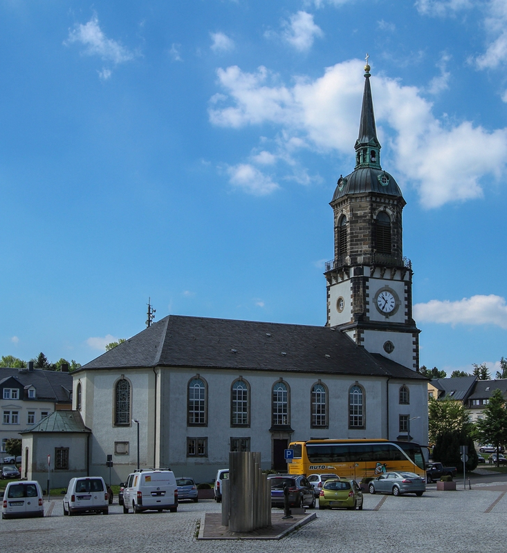 Frauenstein,_Stadtkirche_zu_unserer_lieben_Frau